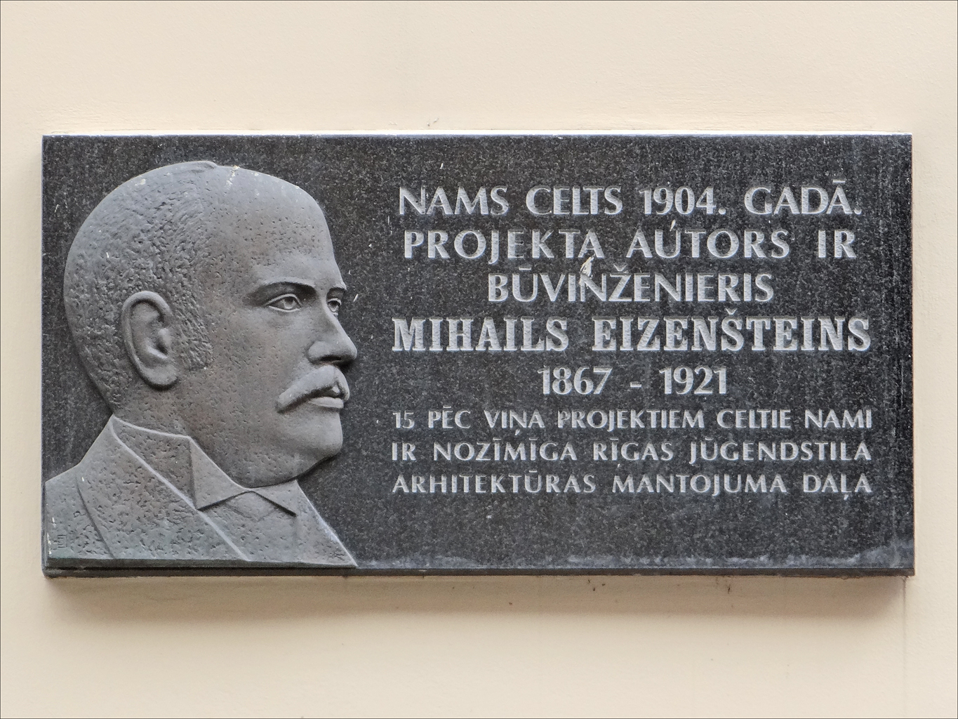 Plaque posée sur l'immeuble au n°4 de la rue Alberta commémorant les œuvres de Mikhail Eisenstein, architecte de Riga à la Belle Époque Cet architecte est le père du célèbre cinéaste Sergueï Eisenstein (1898-1948) qui a soutenu le régime soviétique à la différence de son père qui y était farouchement opposé. Ce bâtiment est considéré comme le chef d’œuvre de l'architecte.